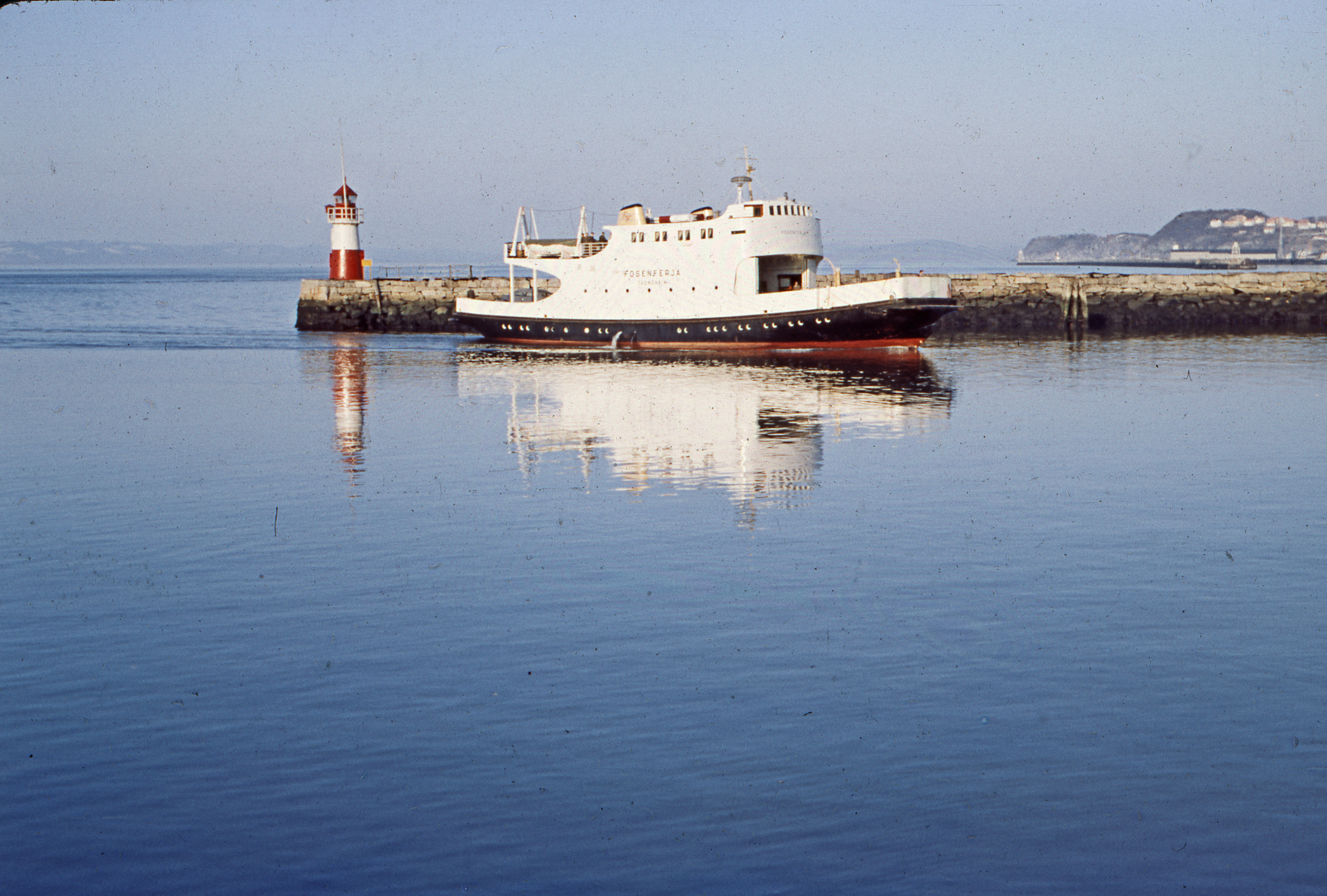 Format: Glasspositiv (Dias) Dato / Date: ca. 1954 - 1968 Fotograf / Photographer: Ukjent Sted / Place: Trondheim Eier / Owner Institution: Trondheim byarkiv, The Municipal Archives of Trondheim Arkivreferanse / Archive reference: Tor.H43.B77.F18570 Merknad: Fra Byantikvarens lysbildesamling. Bildene er merket Trondheim 1954 - 1968, men de aller fleste synes å være fra omkring 1954 / 1955.